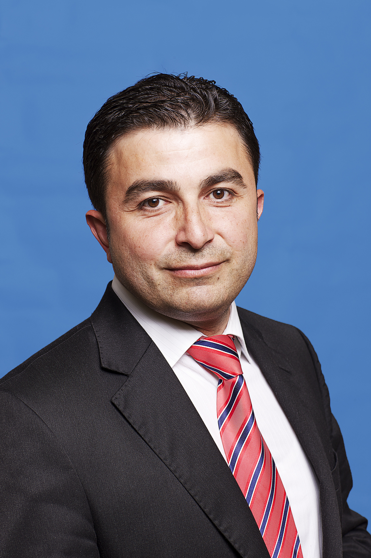 Selçuk Öztürk, Kandidaat-Kamerlid. Foto: Lex Draijer.